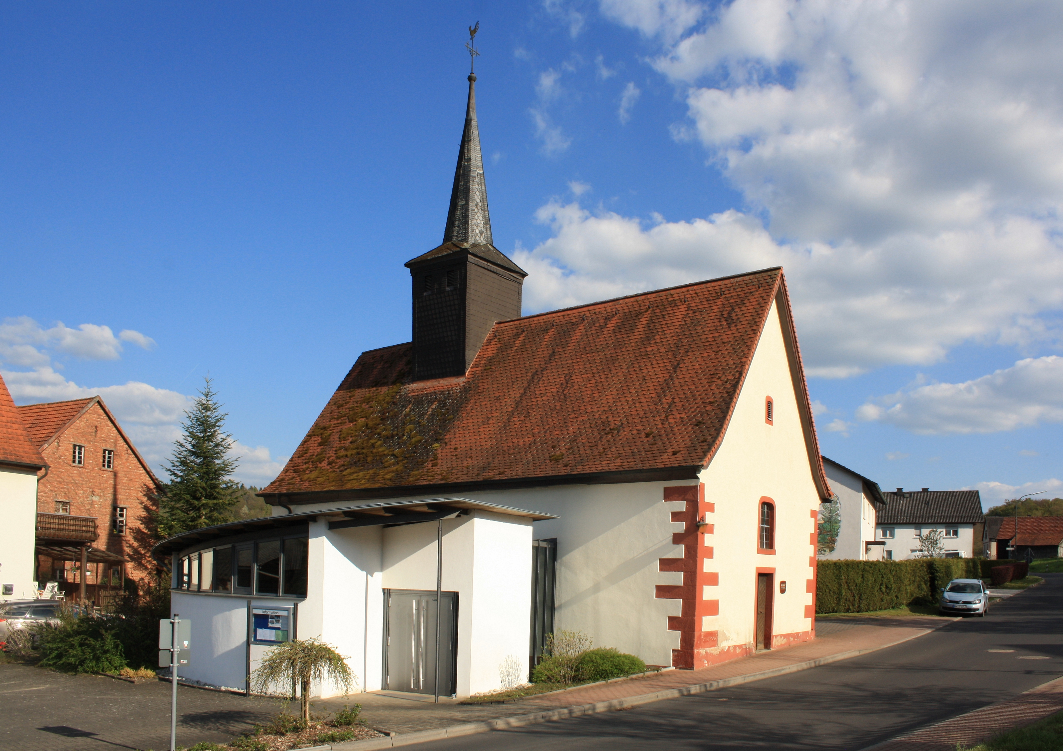 Pfarrkirche St. Odilia in Döllbach